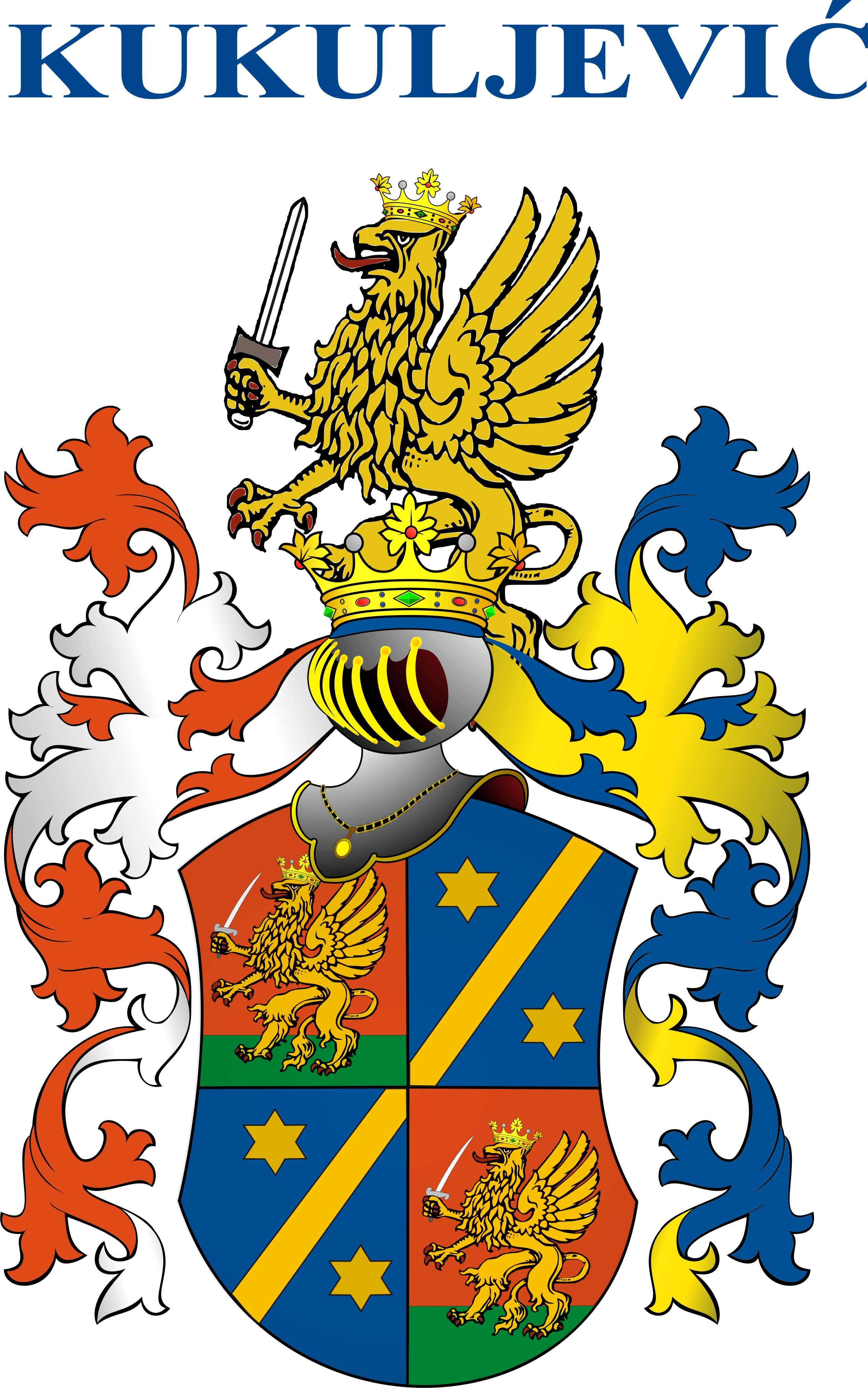 Grb Ivana Kukuljevića Sakcinskog